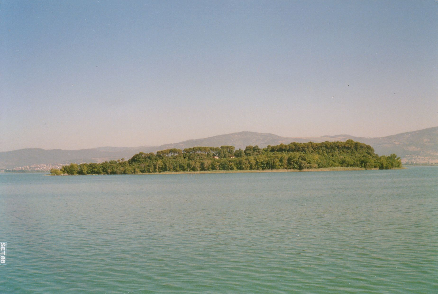 Isola Minore